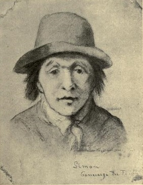 Antoine Simon (1736-1794), disegno, collezione privata